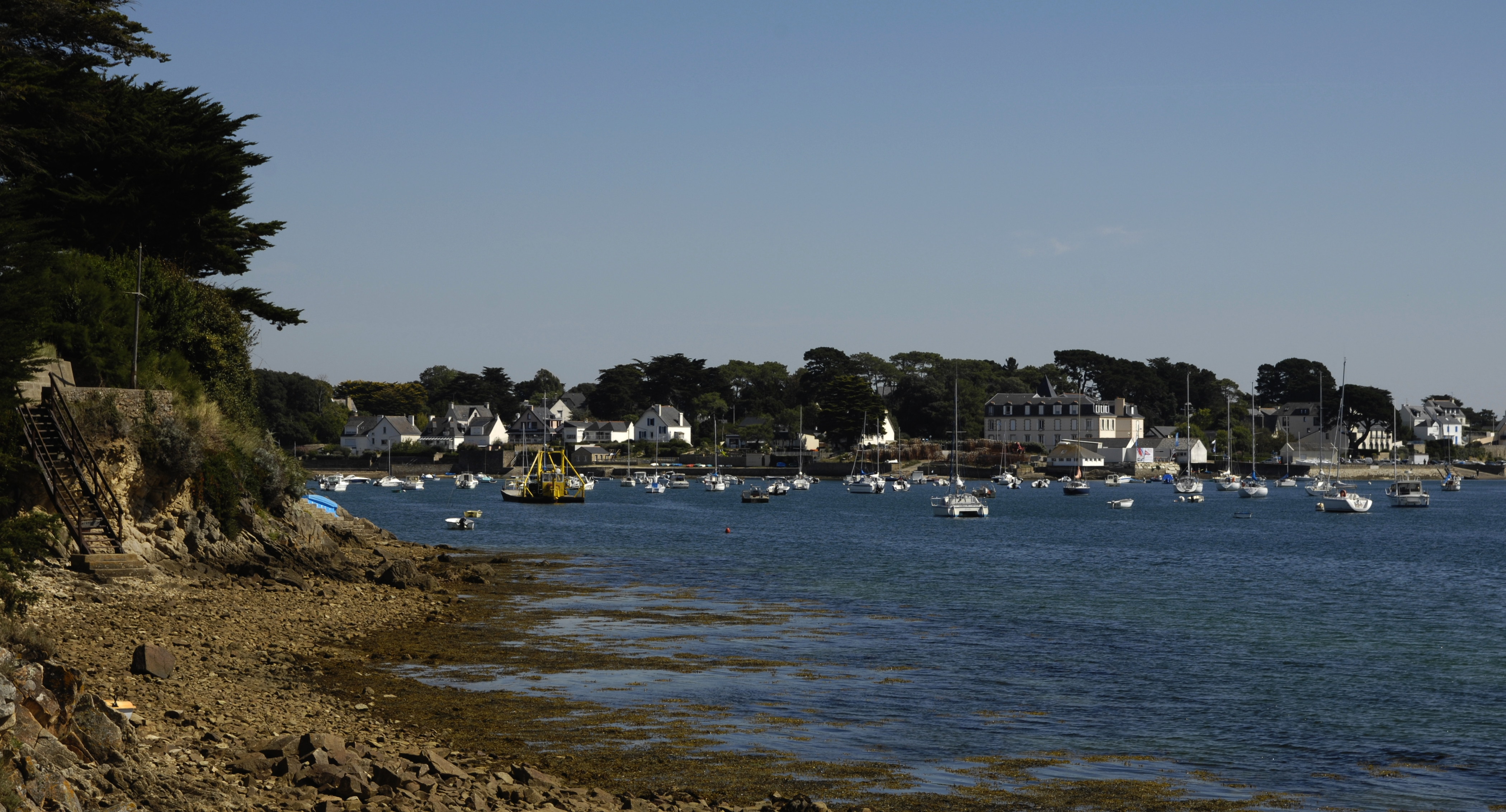 Lamor-Baden, Morbihan, Hafen am golfe du morbihan